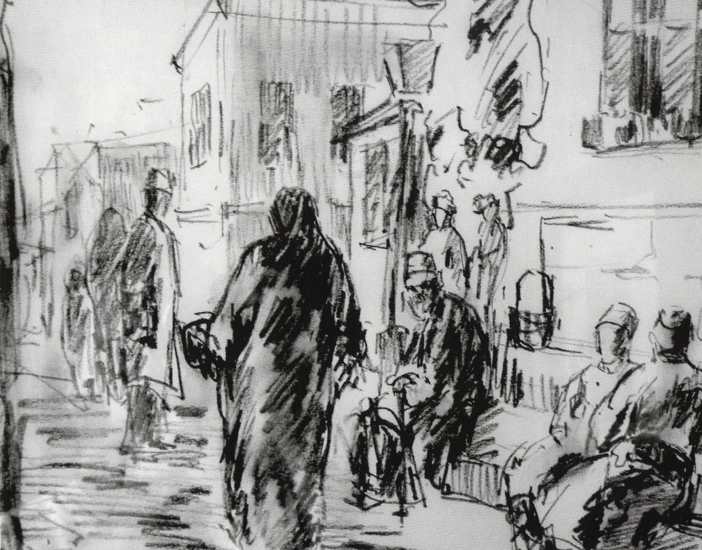 Sorin Adam - Schiţă, desen.